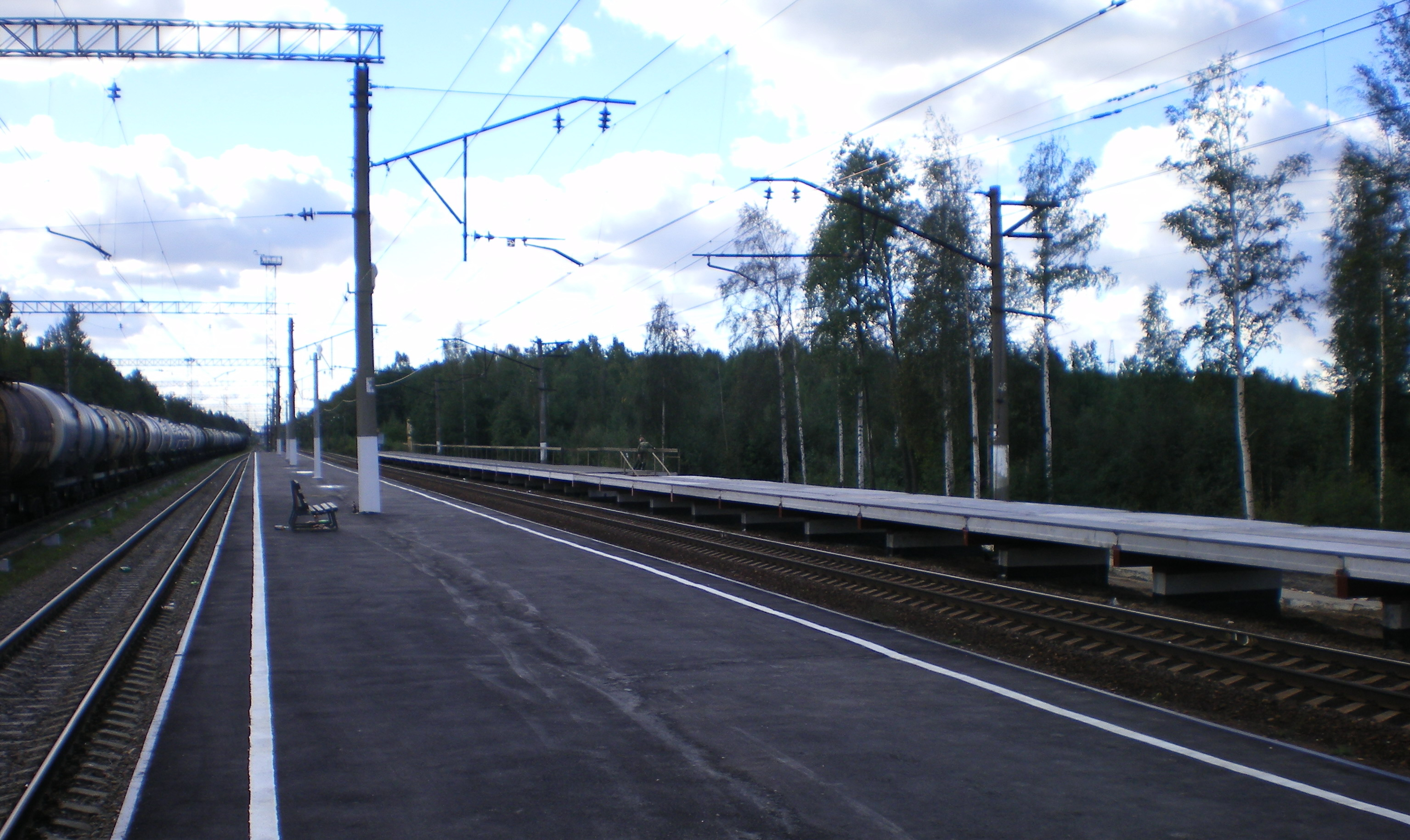 Две платформы на ремонте.